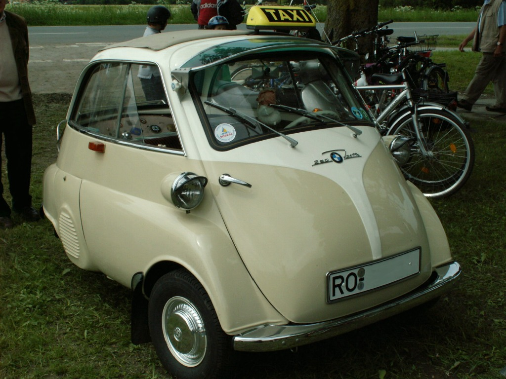 BMW Isetta 250 in Taxioptik. Als Taxi konnte die Isetta jedoch nicht zugelassen werden.